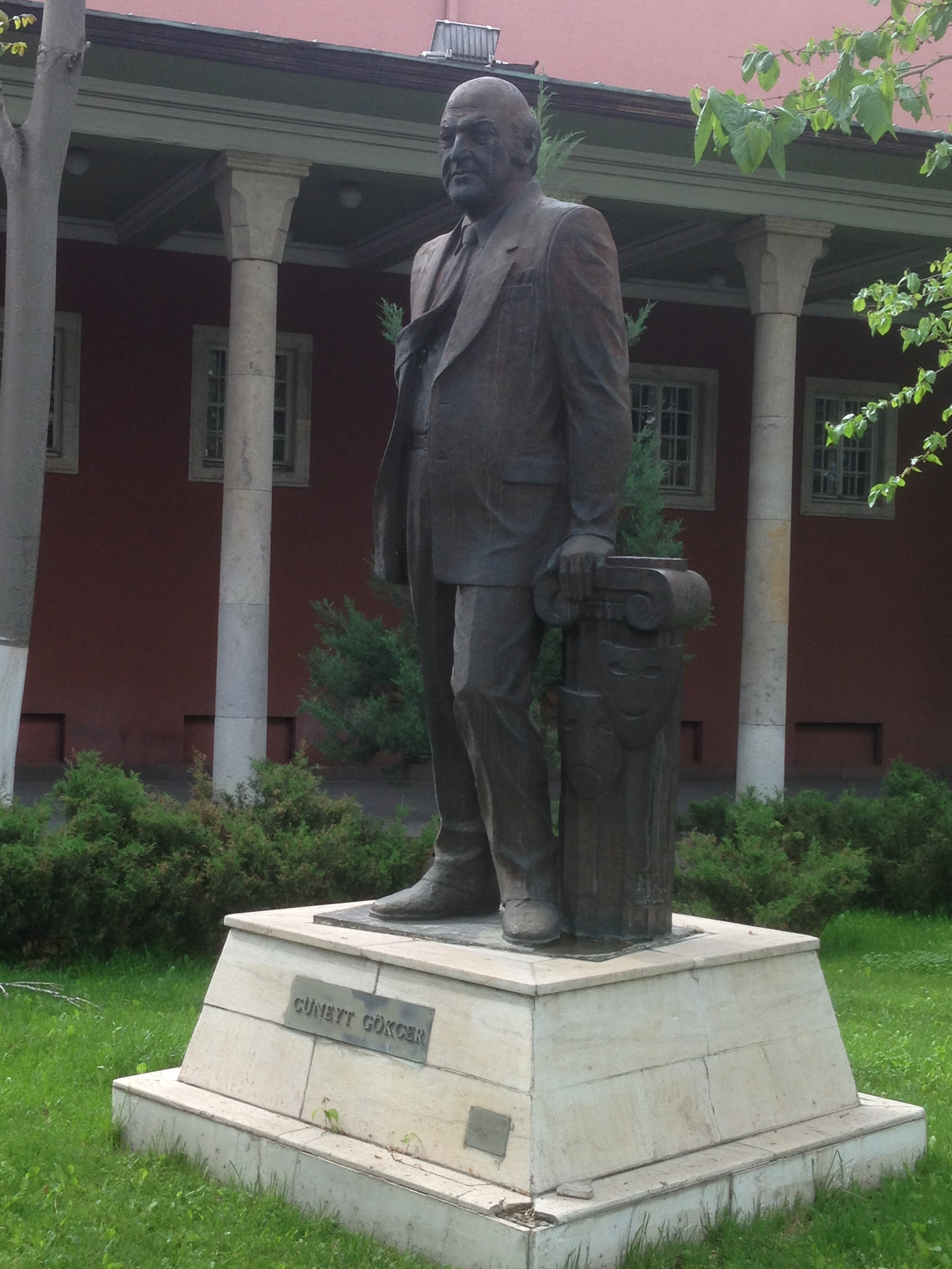 Cüneyt Gökçer heykeli. Ulus, Ankara